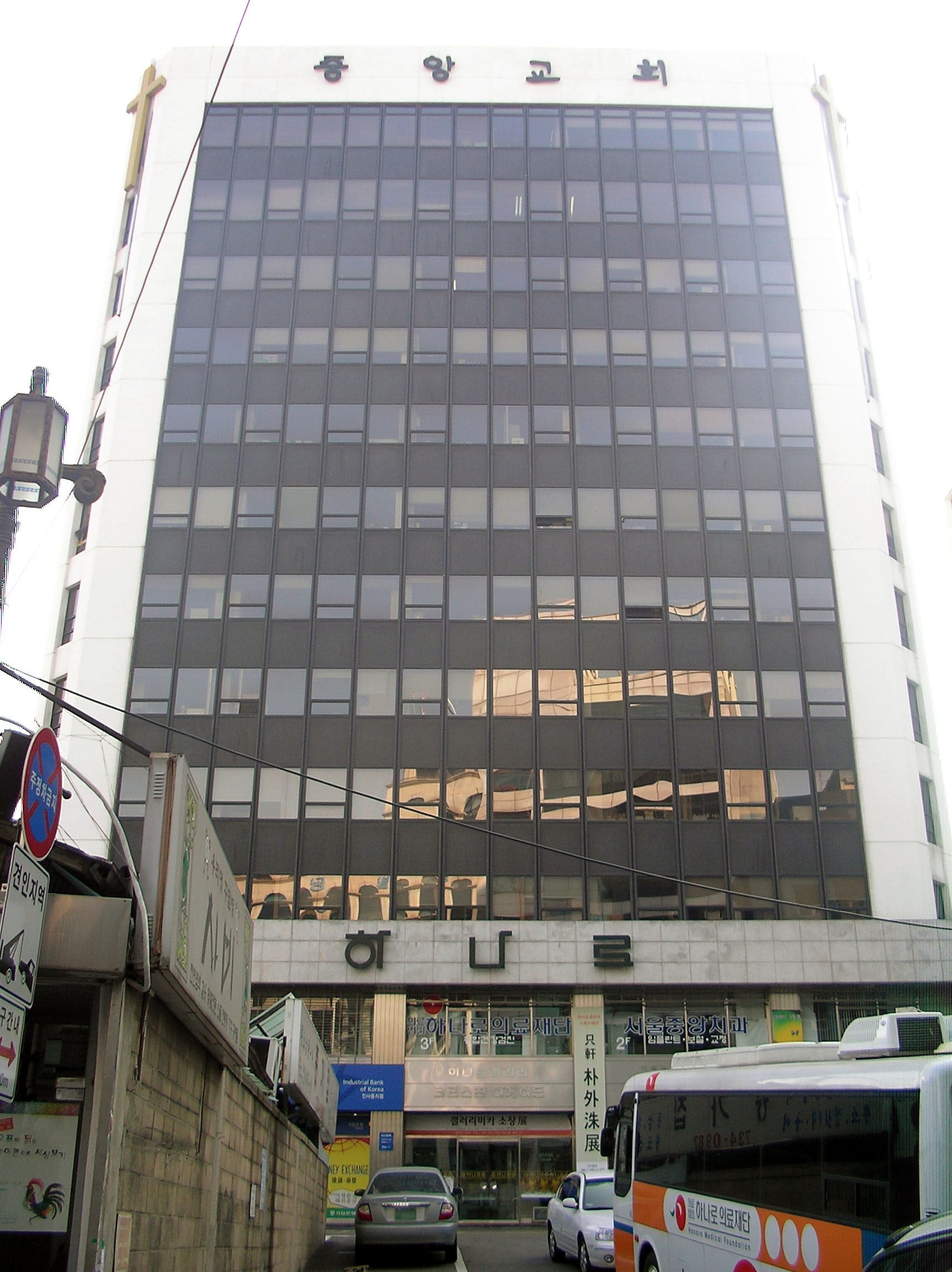 Hanaro building in Insadong, Seoul